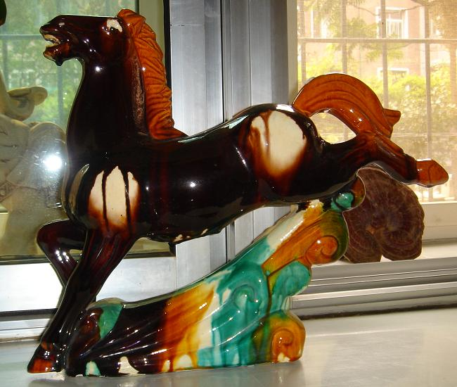 唐三彩马。